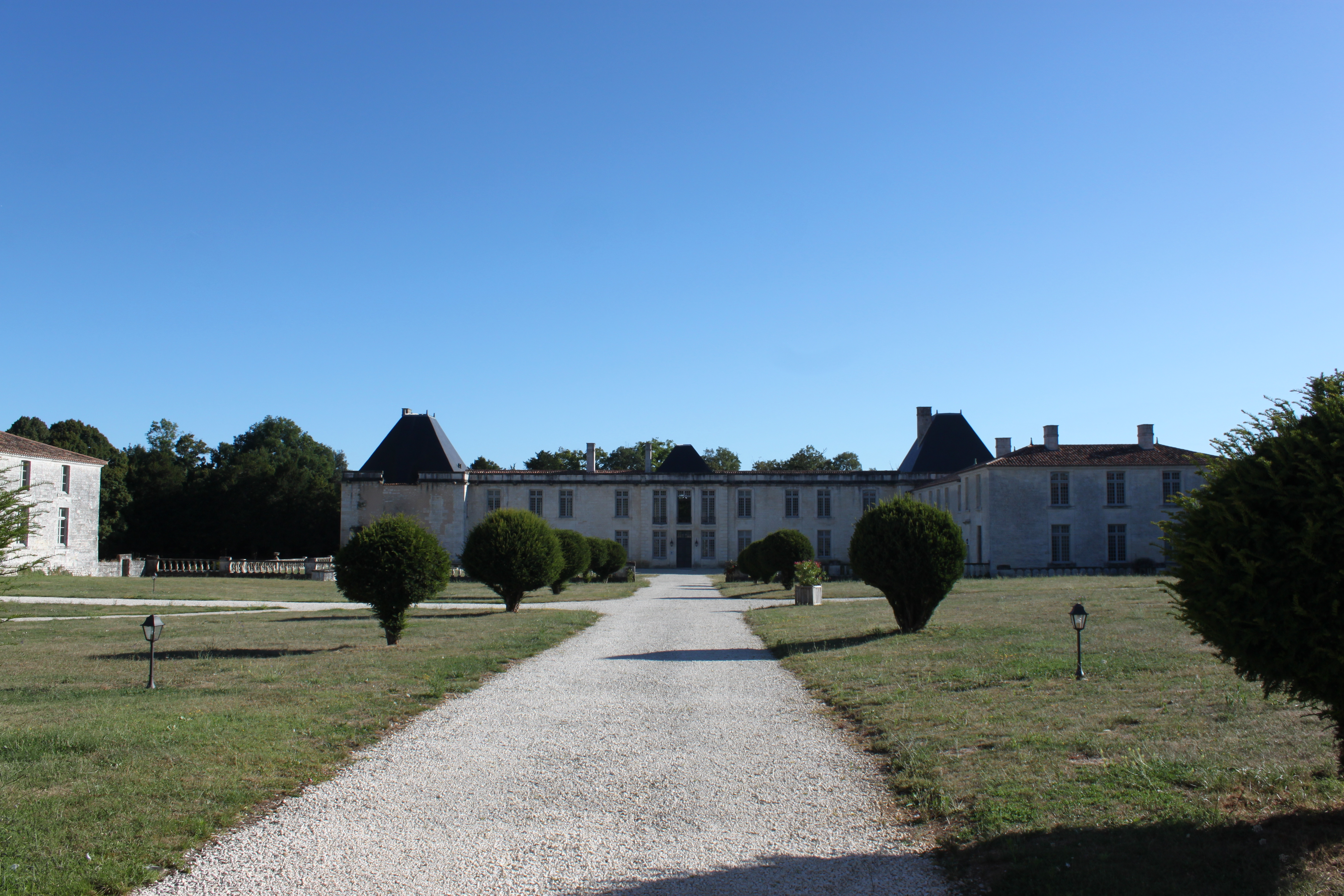 Château, Fr-17-le Douhet.